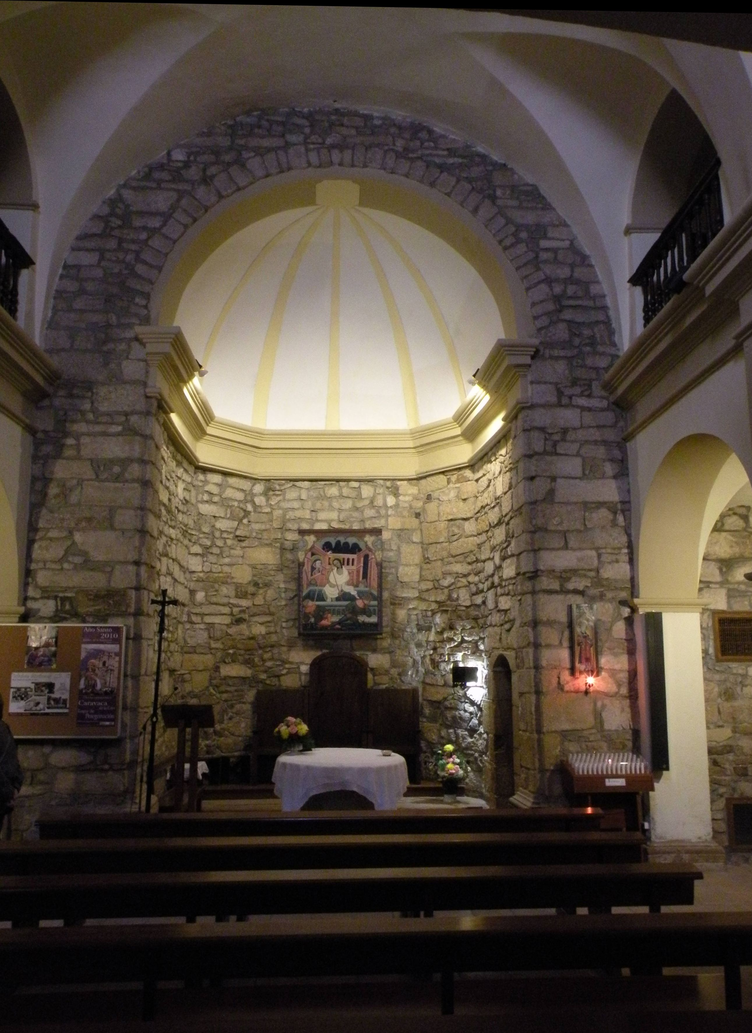 Capella de Sant Esteve de Guimerà. Es troba a la part baixa de la vila. Fou construïda durant la primera meitat del segle XIV. L'edifici és de planta basilical amb absis poligonal, flanquejat per quatre capelles. L'any 1983 es restaura la capella i s'hi col·loca les reproduccions de dues taules gòtiques del retaule de Sta Maria, obra de Ramon de Mur.